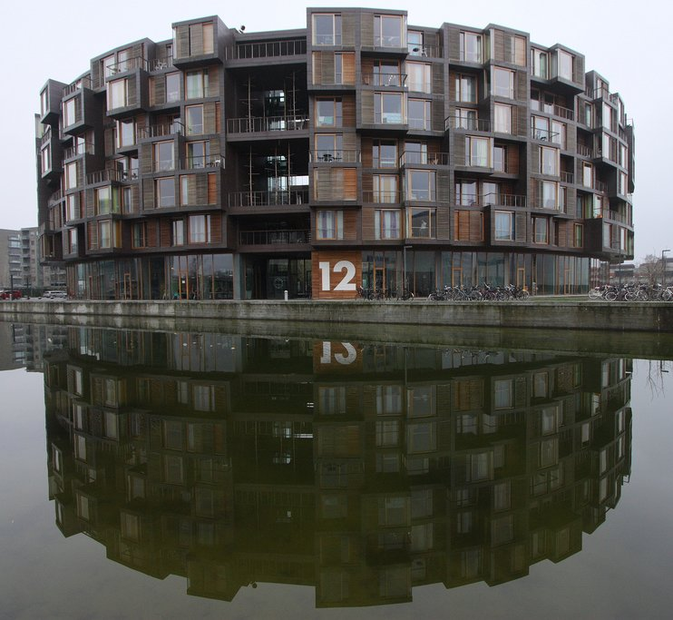 Tietgenkollegiet student husing in the Ørestad district of Copenhagen, Denmark